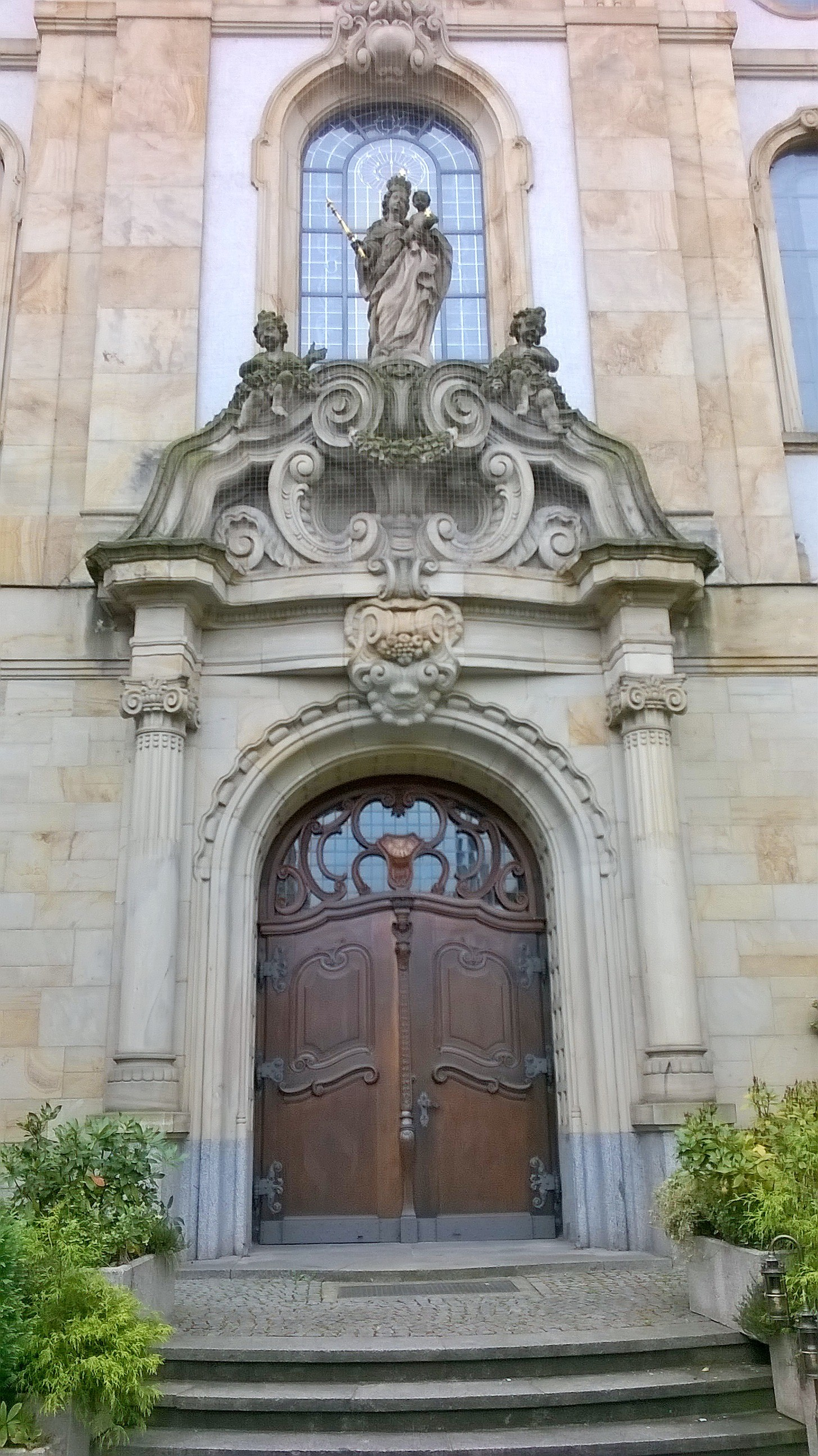 Portal der Marienkirche in Offenbach am Main